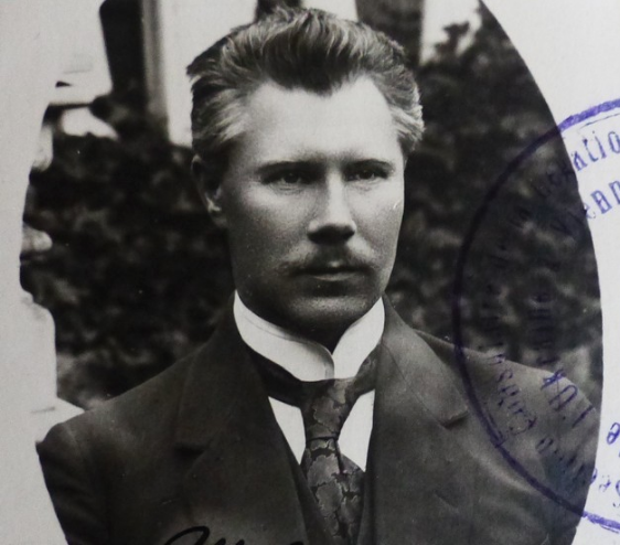 Фотокартки Ф. Швеця, якому 11 листопада 1917 р. виповнилося 35 років. 4 червня 1908 р., 1920 р., 30 листопада 1930 р.